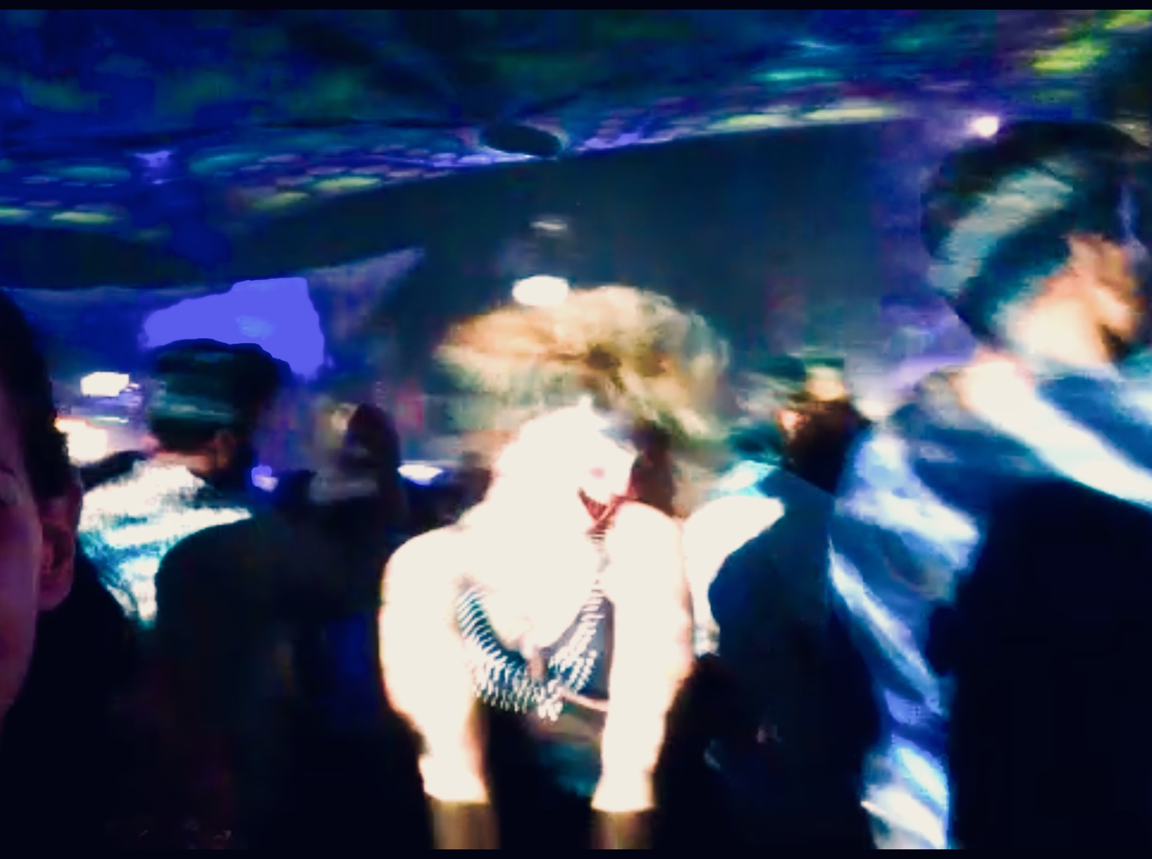 מסיבאת טראנס בהודו